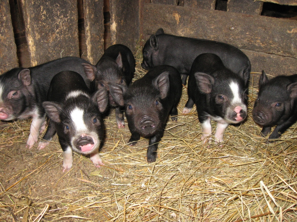 Как и большинство детенышей, поросята вьетнамской свиньи очень любопытны